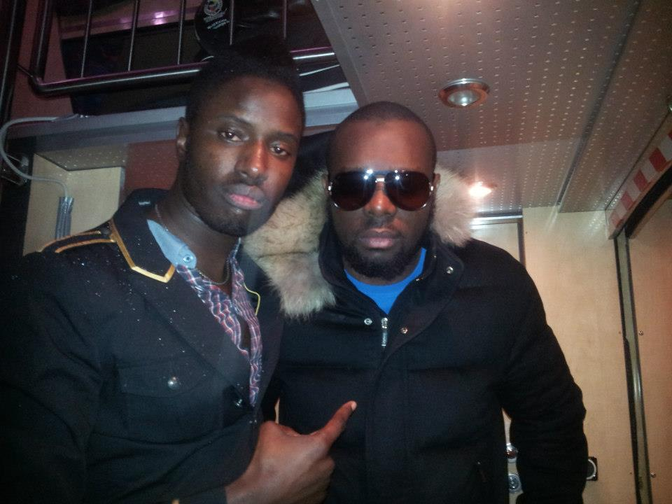 Maitregims et Daniel Nd'ao